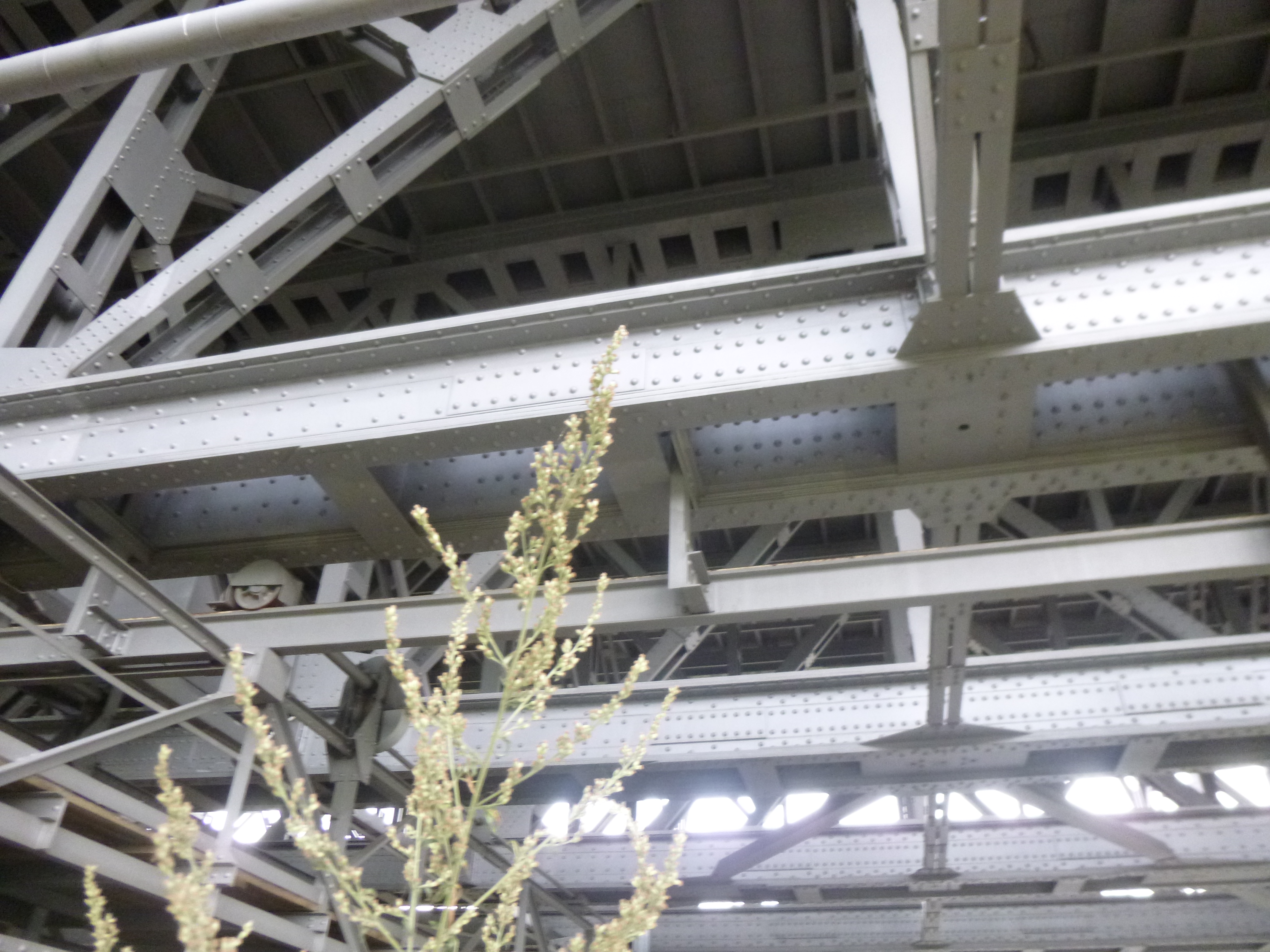 Genietete Stahlträger des Schiffshebewerks Niederfinow